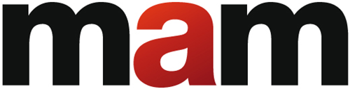 São Paulo Museum of Modern Art